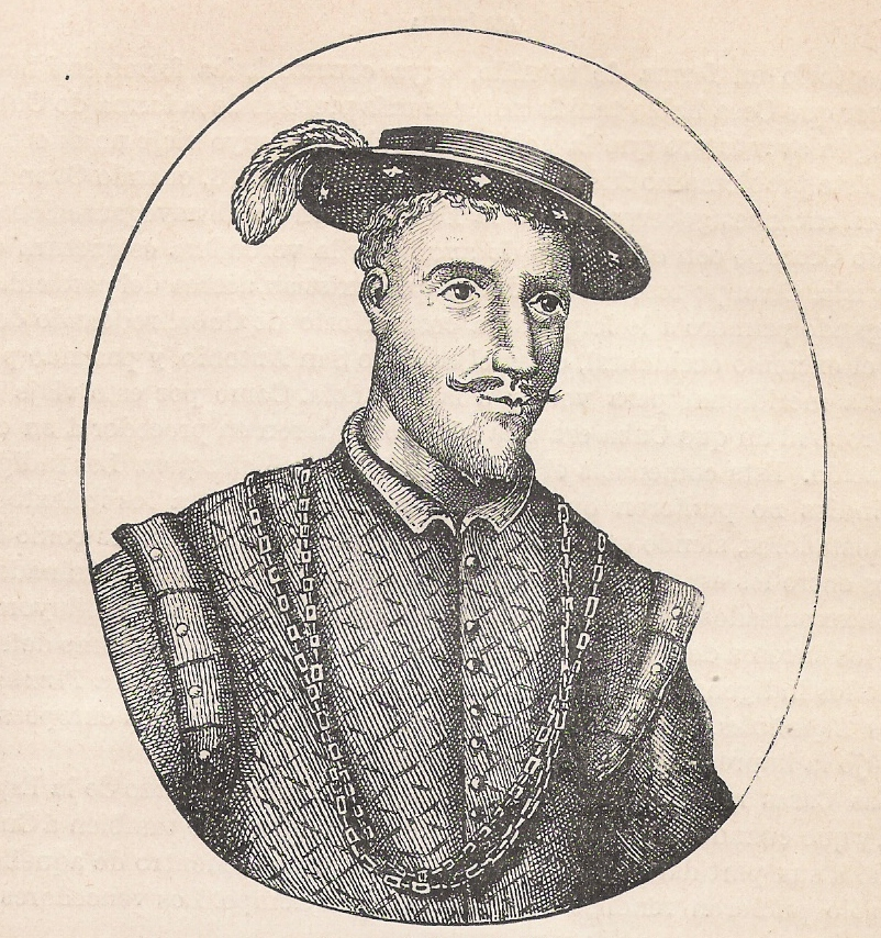 Juan de Grijalva según el libro Historia General de los Hechos de los Castellanos, de Antonio de Herrera y Tordesillas